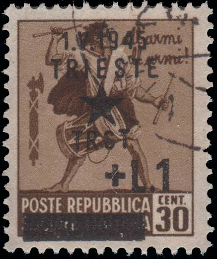 Почтовая марка Триеста, 1945 Yugoslav occupation of Trieste, overprinted on stamp of the Italian Social Republic